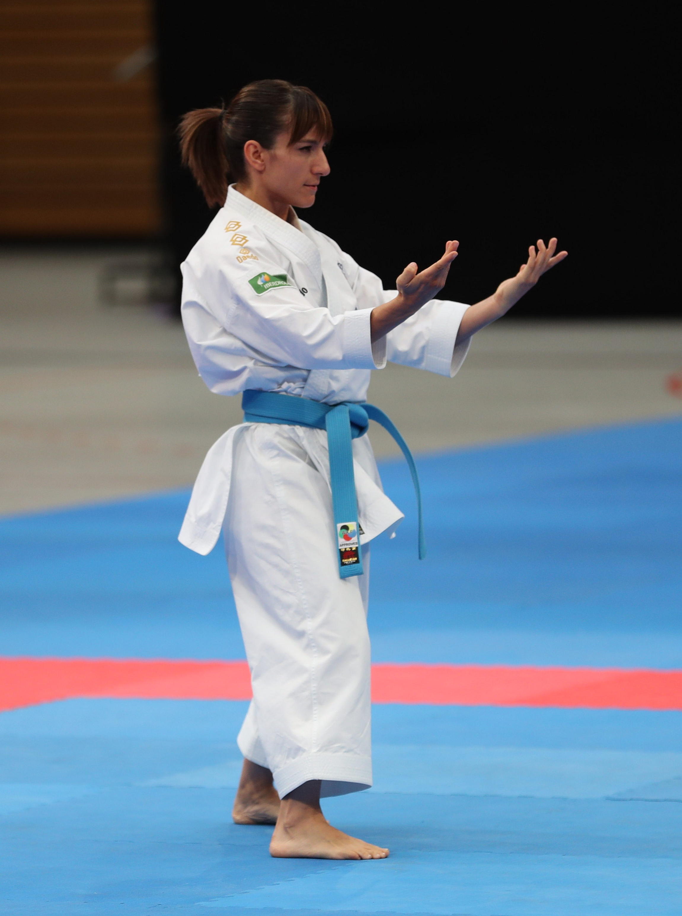 Female Kata am 16. September 2018 in der Karate1 Premier League Berlin 2018. Abgebildet: Jaime Sandra Sanchez.